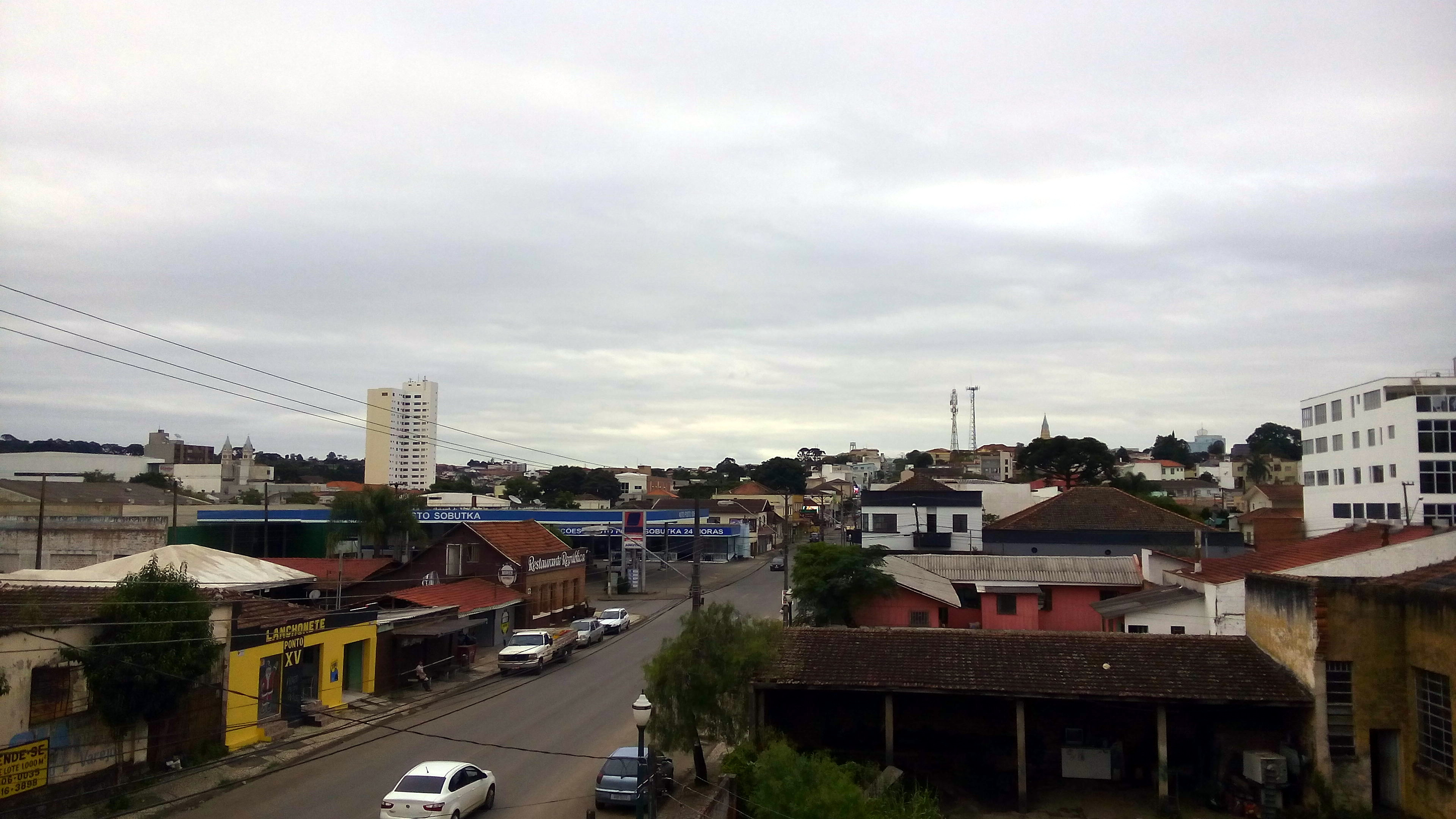 Vista de la rua 15 de Novembro, en Irati, estado de Paraná, Brasil.